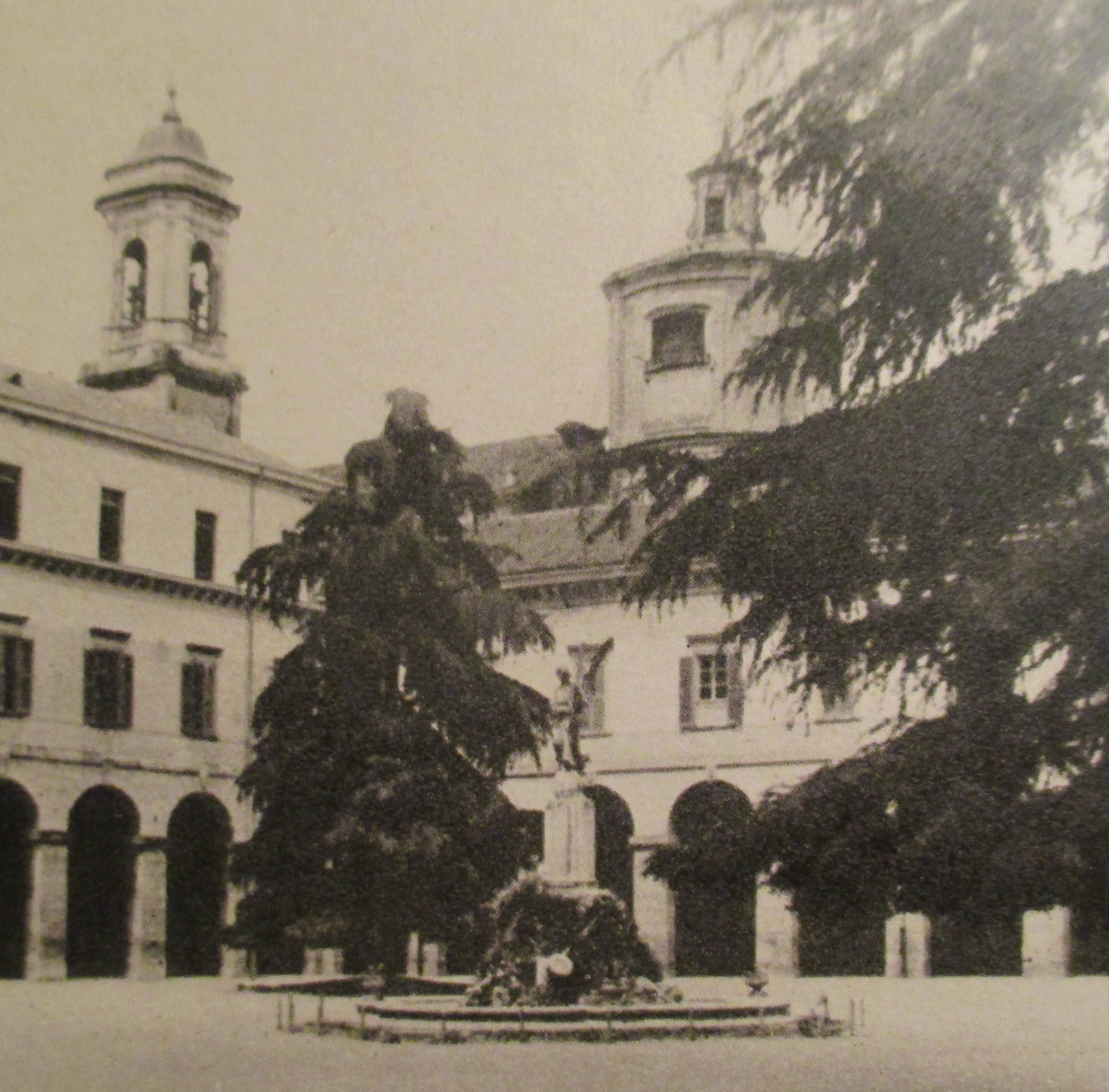 Petit séminaire de Seveso où Achille Ratti (futur Pie XI) poursuivit ses études.